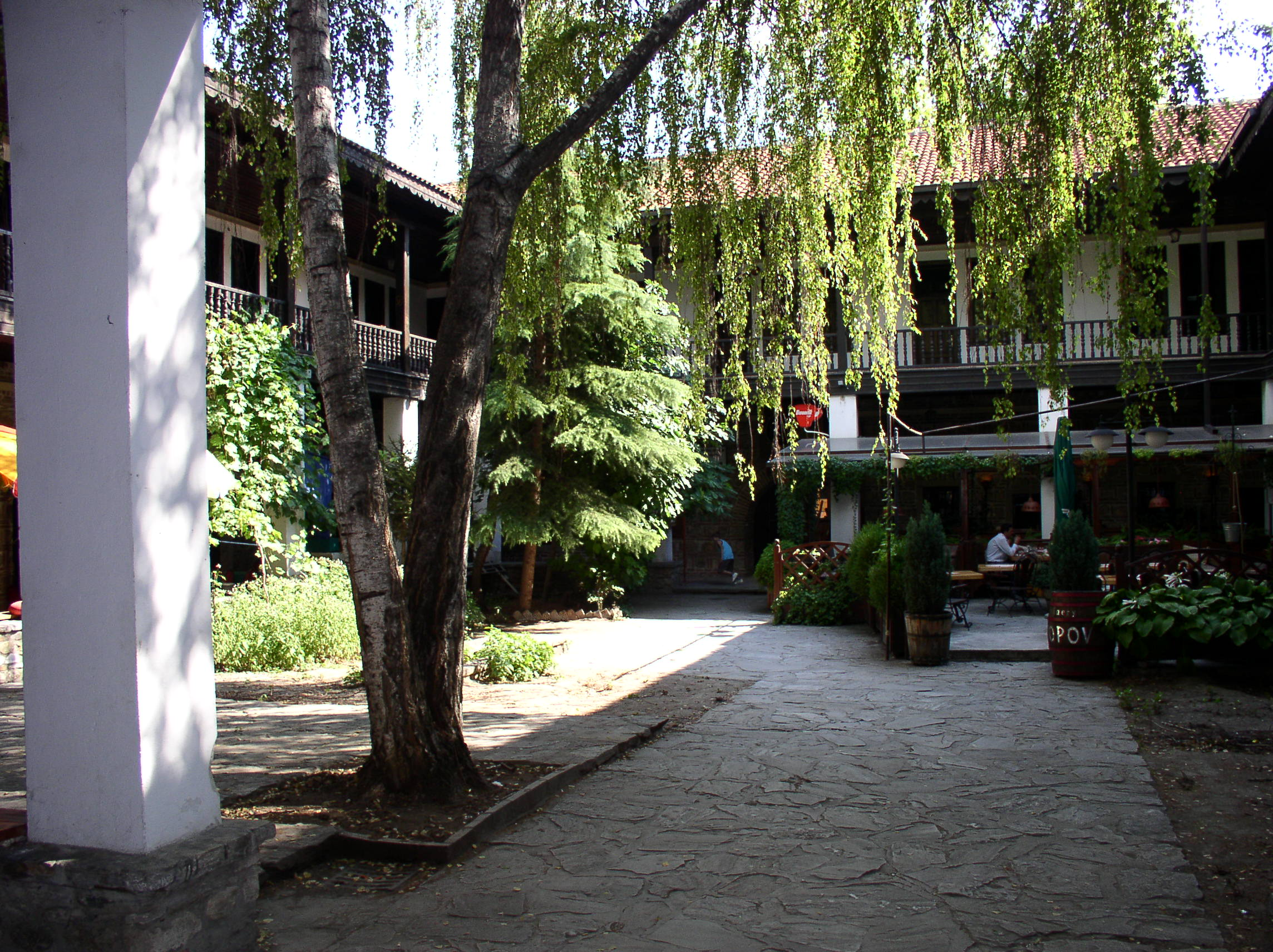 Капан хан у Скопској старој чаршији